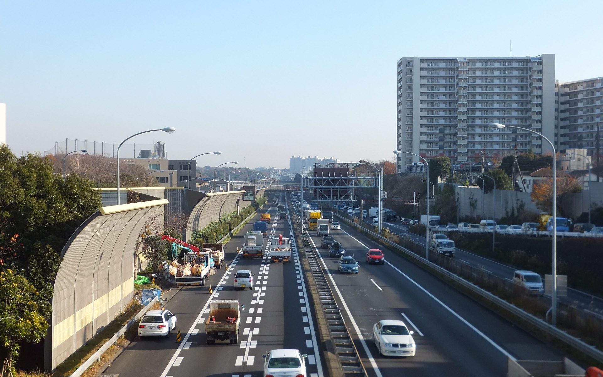 京葉道路穴川インター付近にて